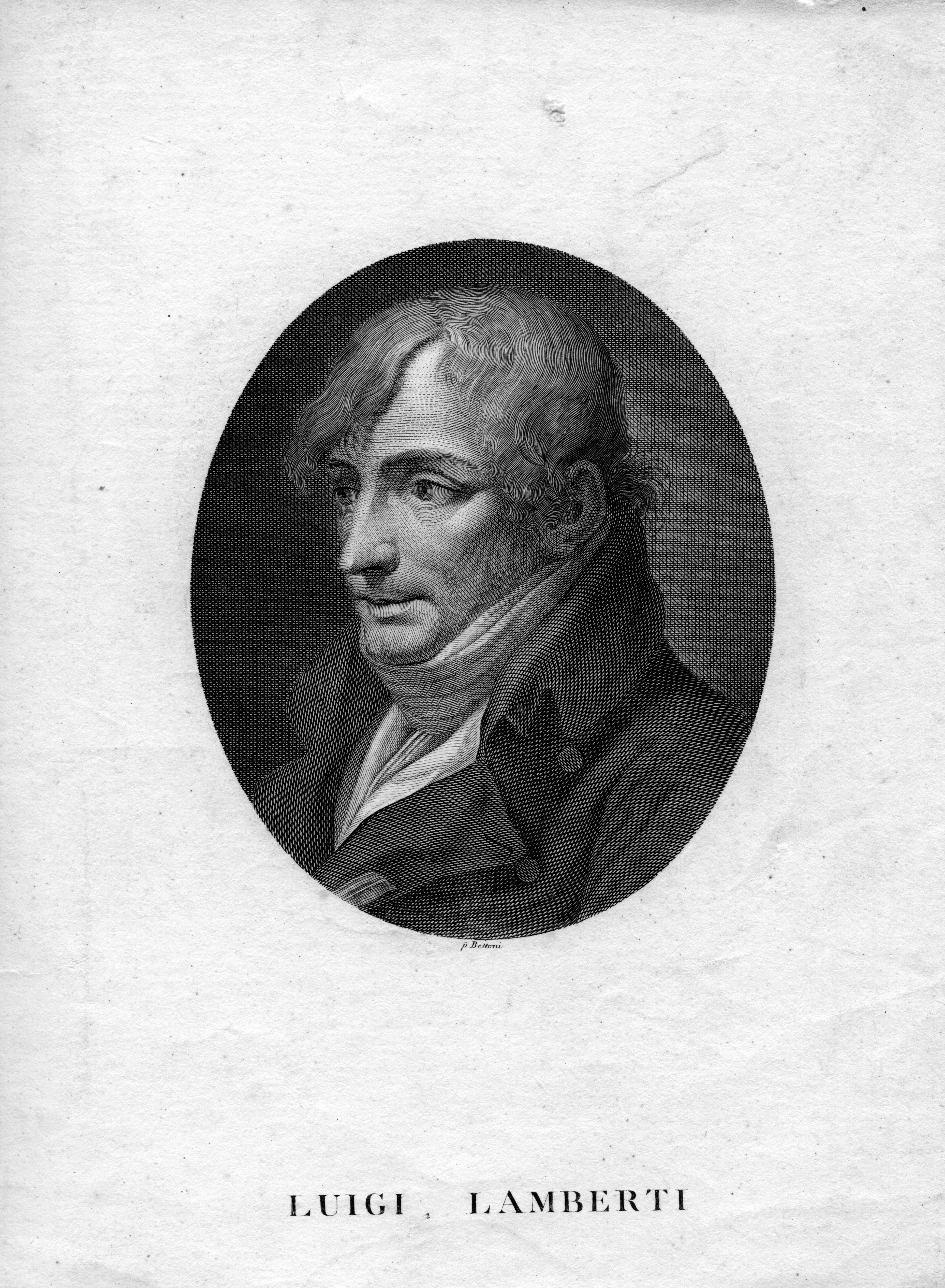 portrait gravé